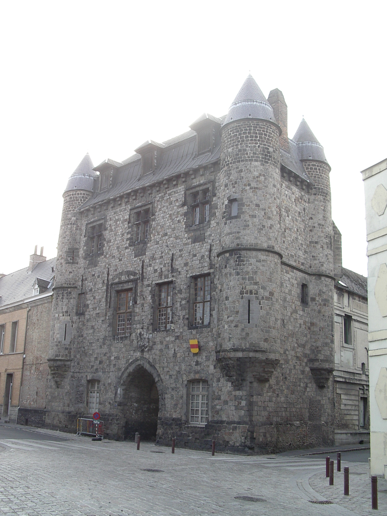 Château de Bailleul (1411) à Condé-sur-l'Escaut.